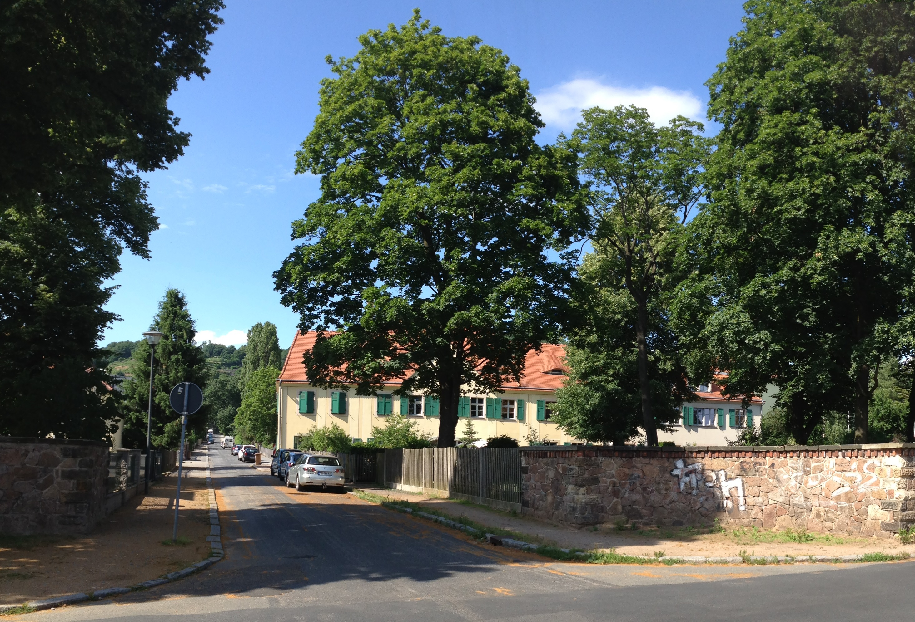 Gasthof „Zum Russen“, Hauptstraße